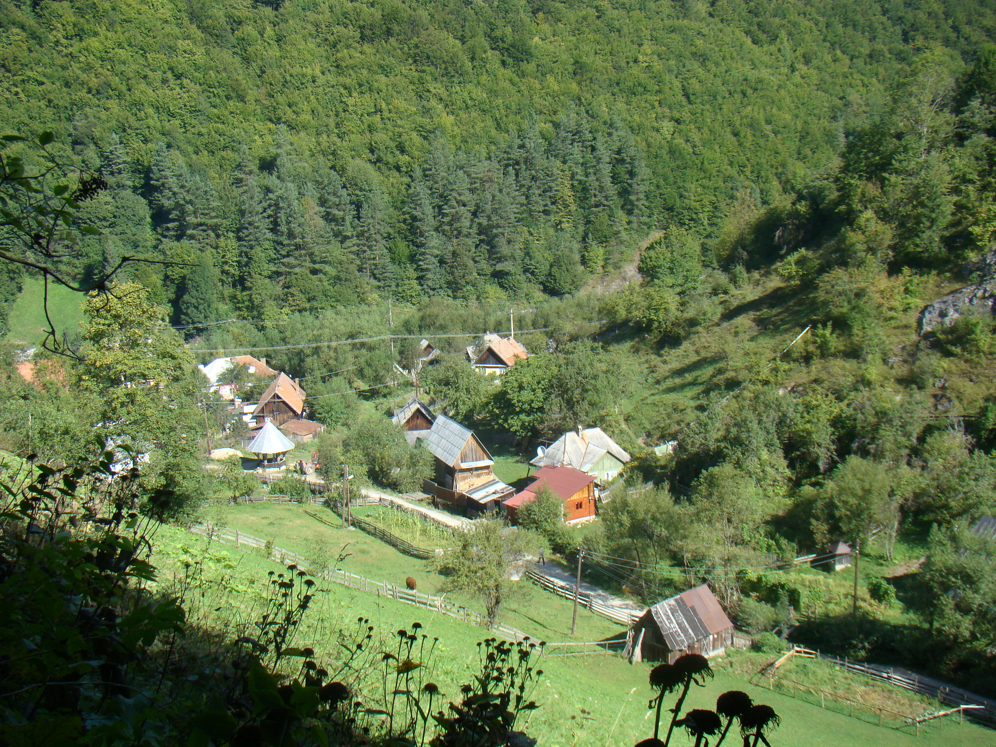 Case din satul Izbita, jud. Alba, Romania